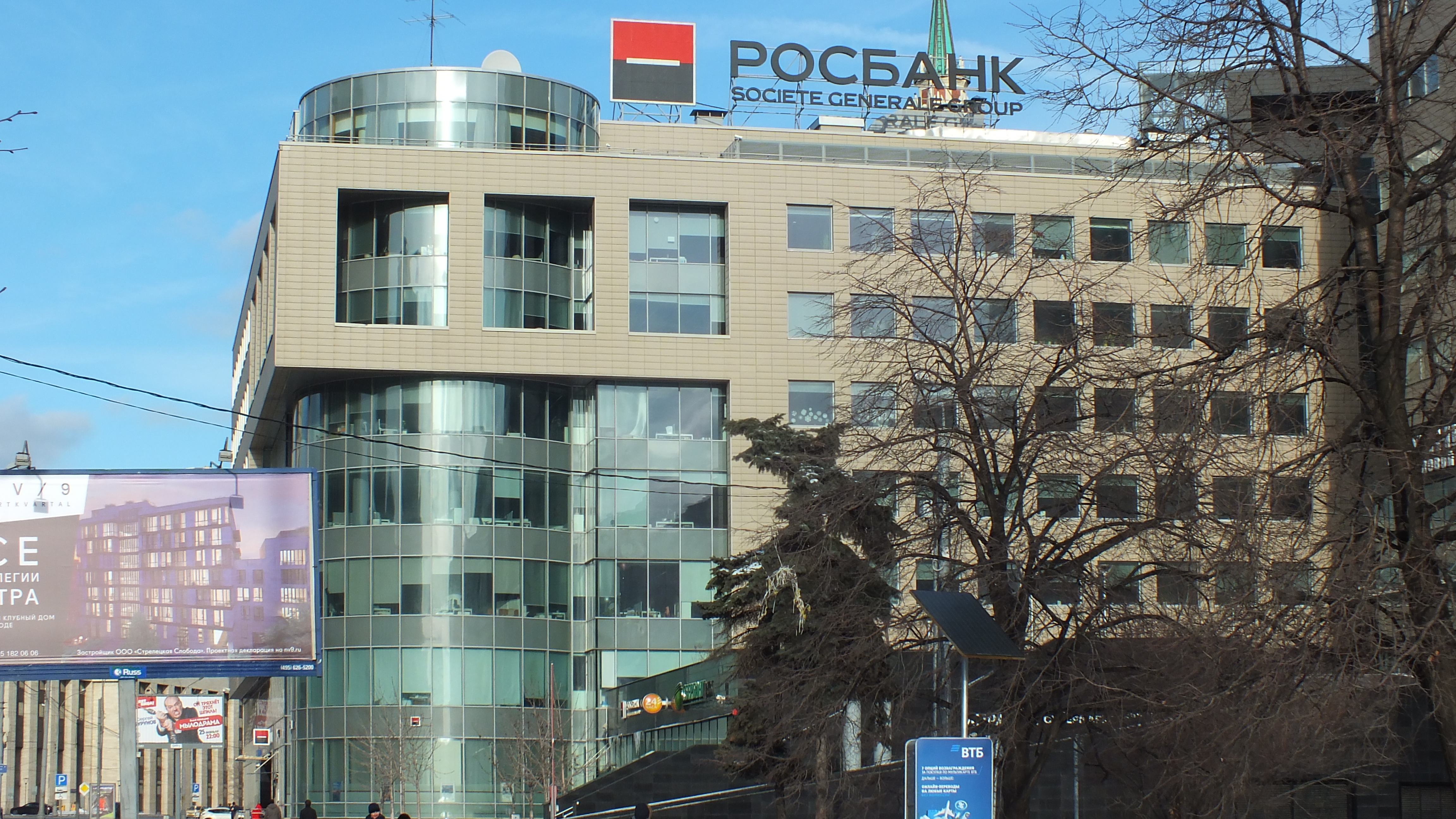 Банк «Росбанк» на улице Маши Порываевой (дом 34)